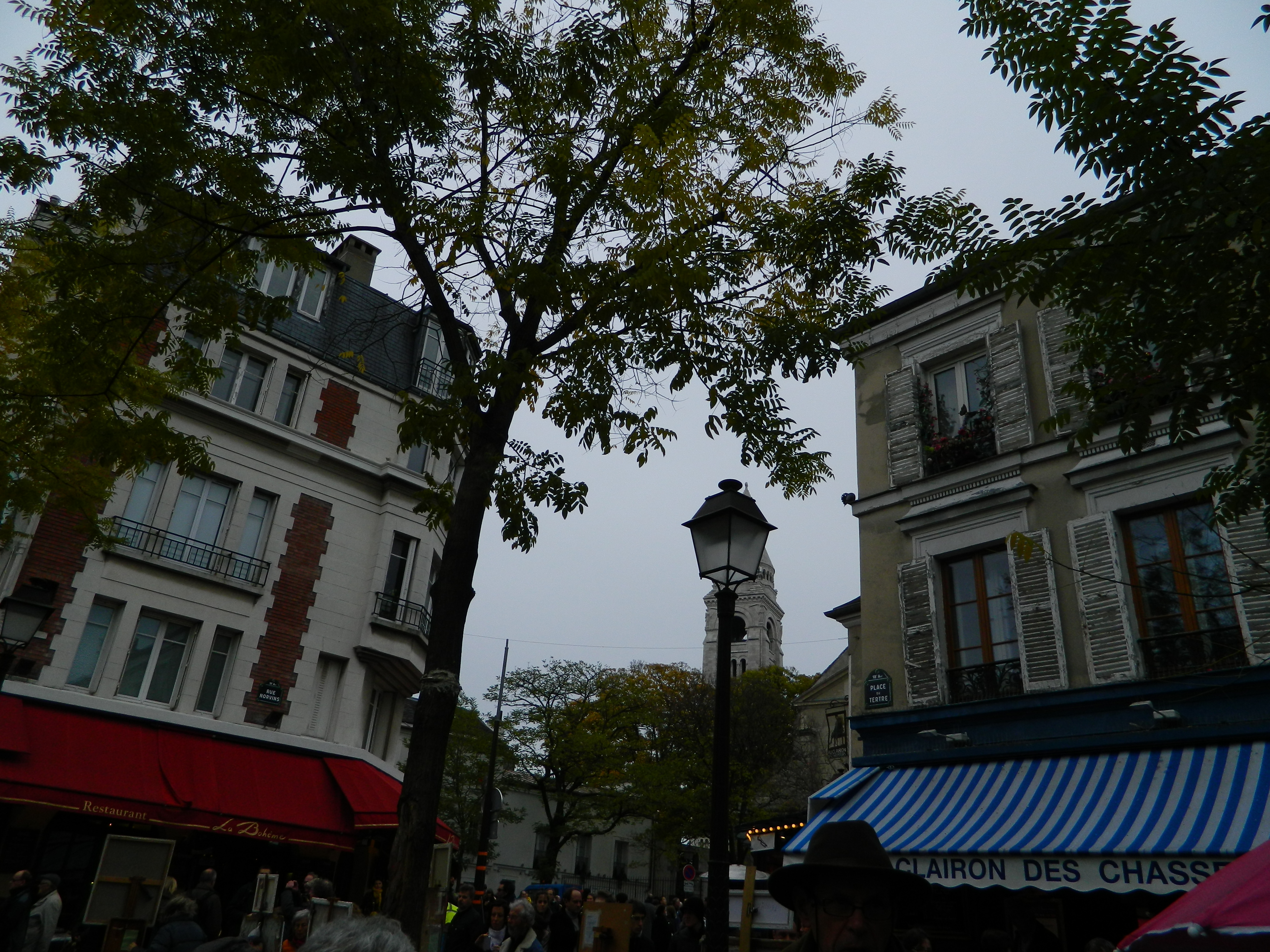 Place du Tertre, XVIIIe arrondissement, Paris, France.